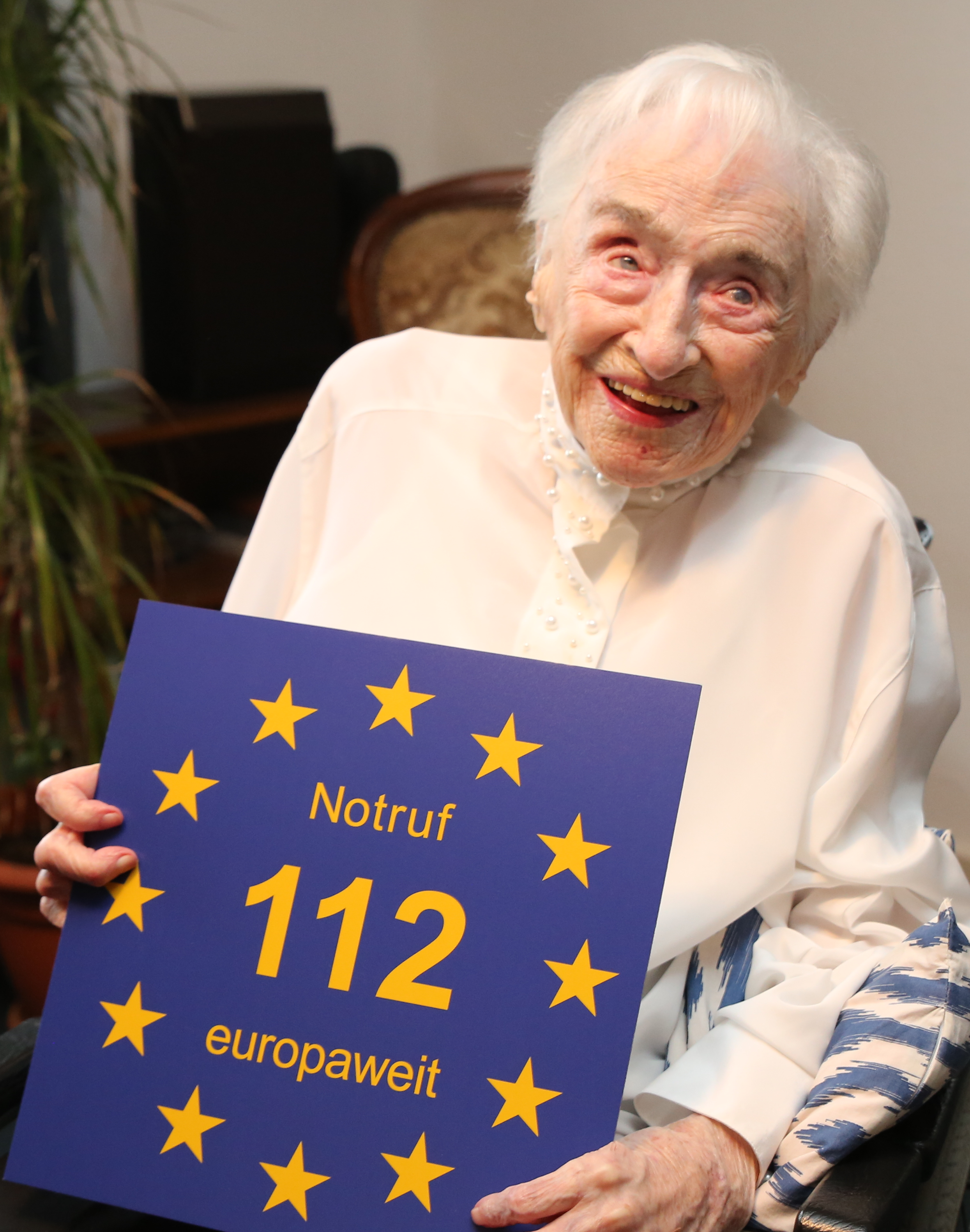 Edelgard Huber von Gersdorff, 112 Jahre alt, wird Ehren-Schirmherrin der Aktion "Ein Europa - eine Nummer: 112" mit der der Euronotruf bekannter gemacht wird.